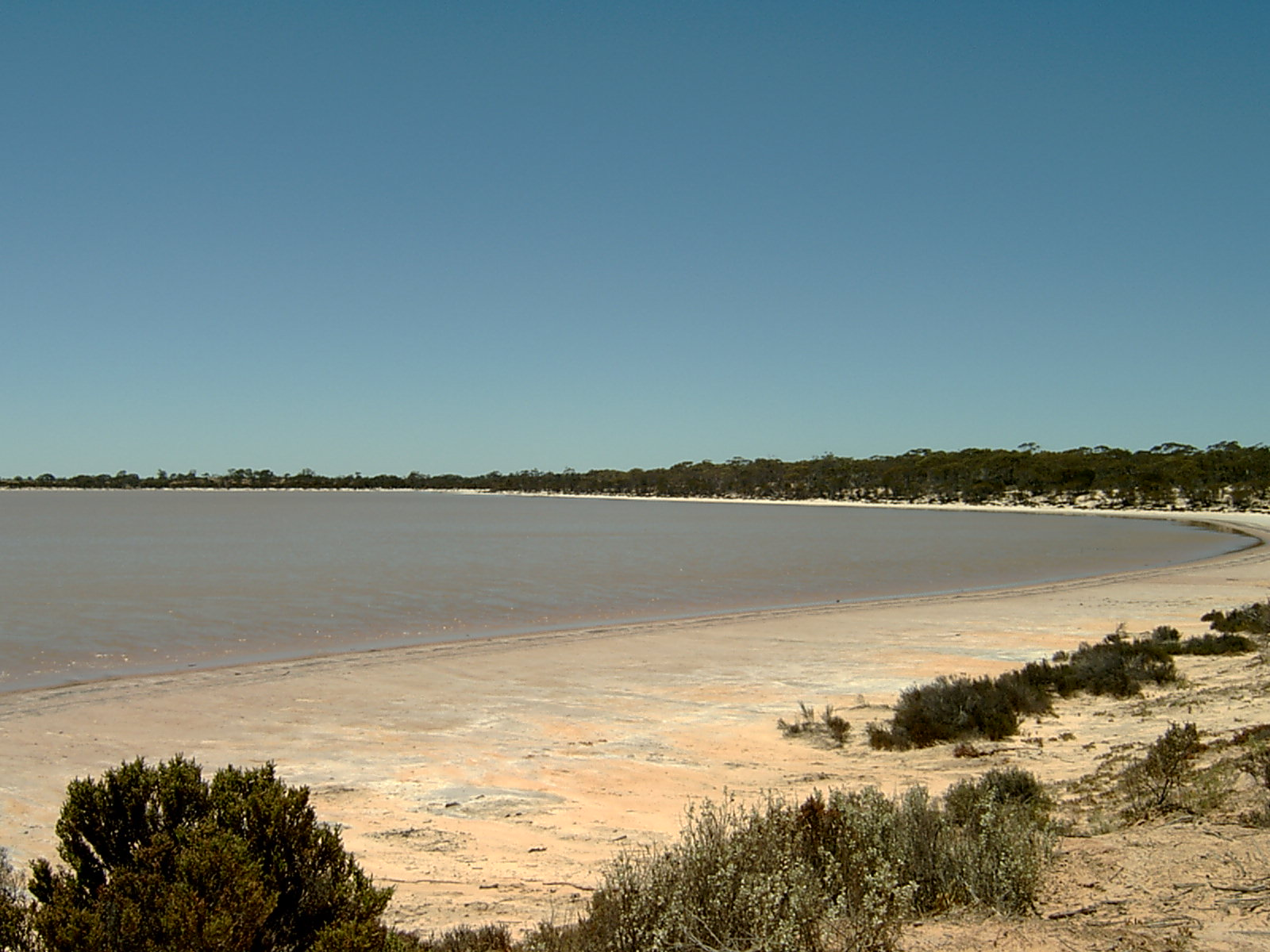 01 Lake Gilles 03